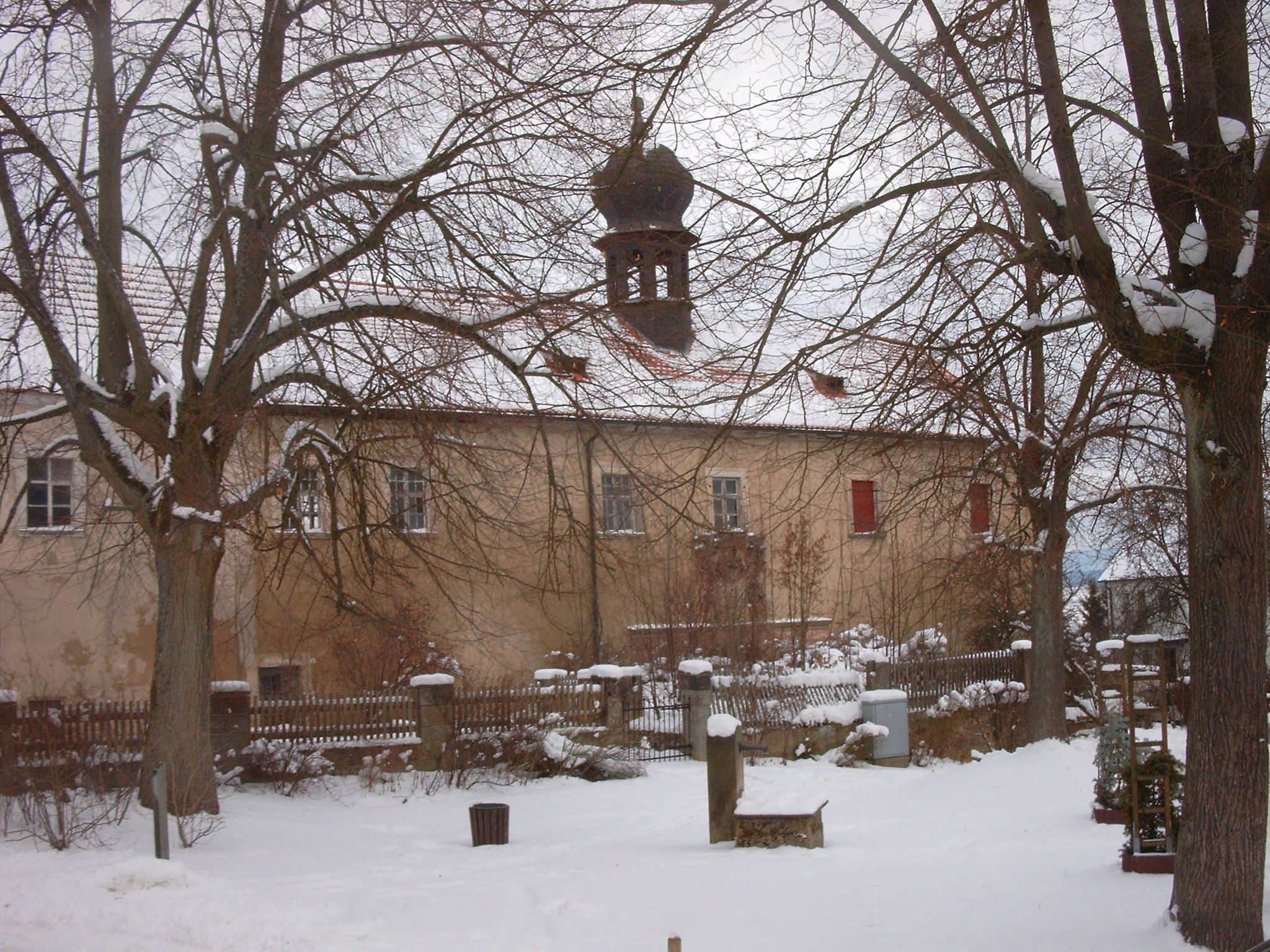 Schloss Emtmannsberg - eigentlich der Eingang zum ehem. Schlossareal, das Hauptgebäude ist nicht erhalten